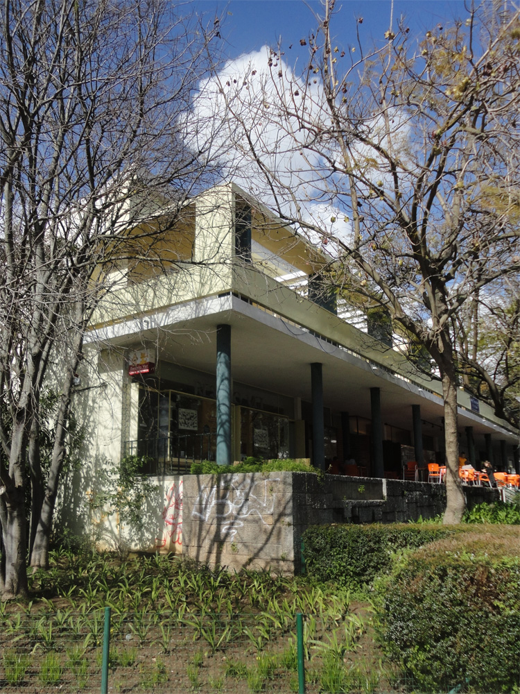 Centro Comercial, Restelo; Arq. R. Chorão Ramalho